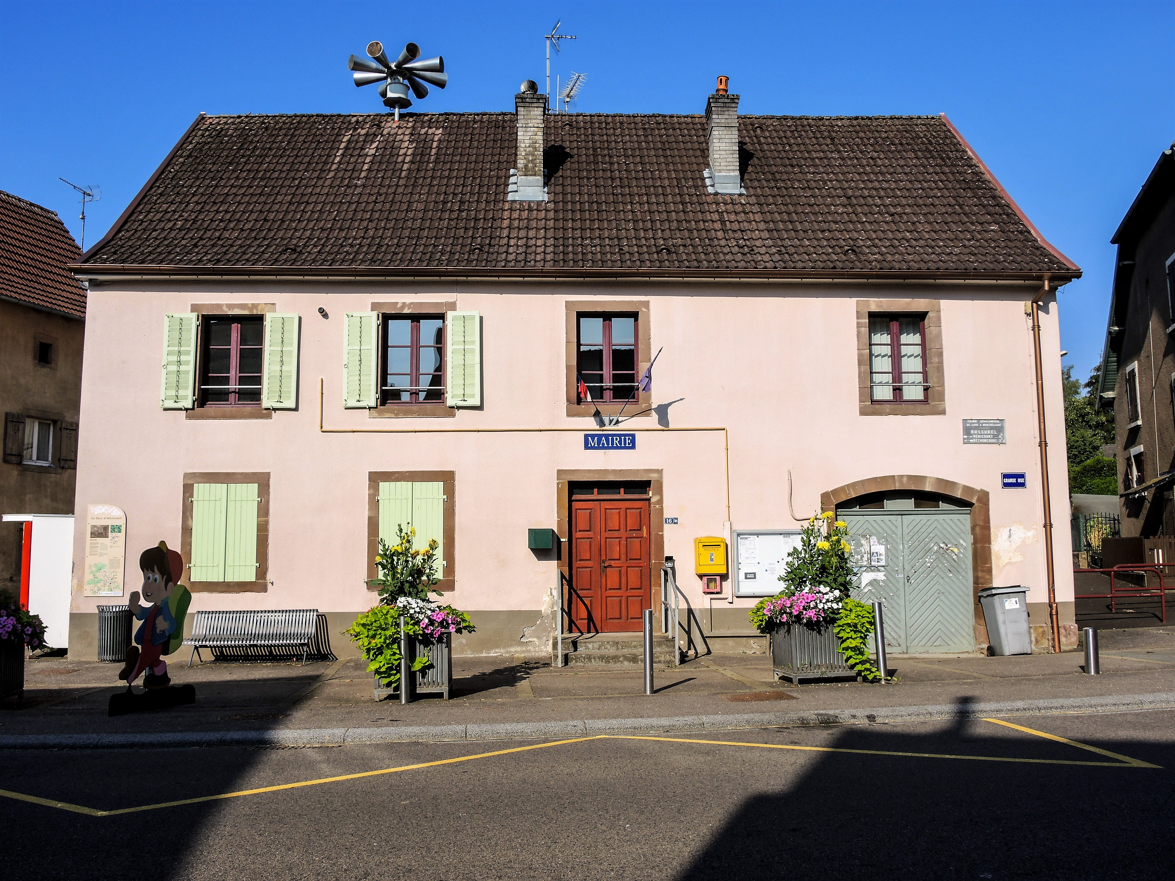 Façade de la mairie de Bussurel. Haute-Saône.